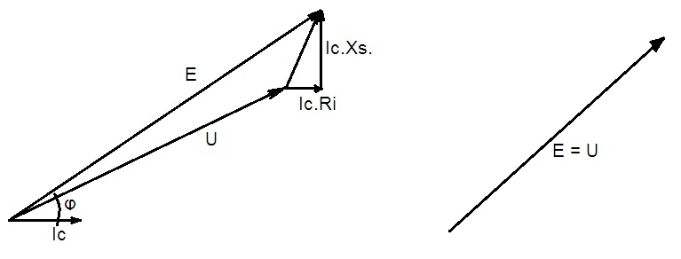 Diagrames vectoriales